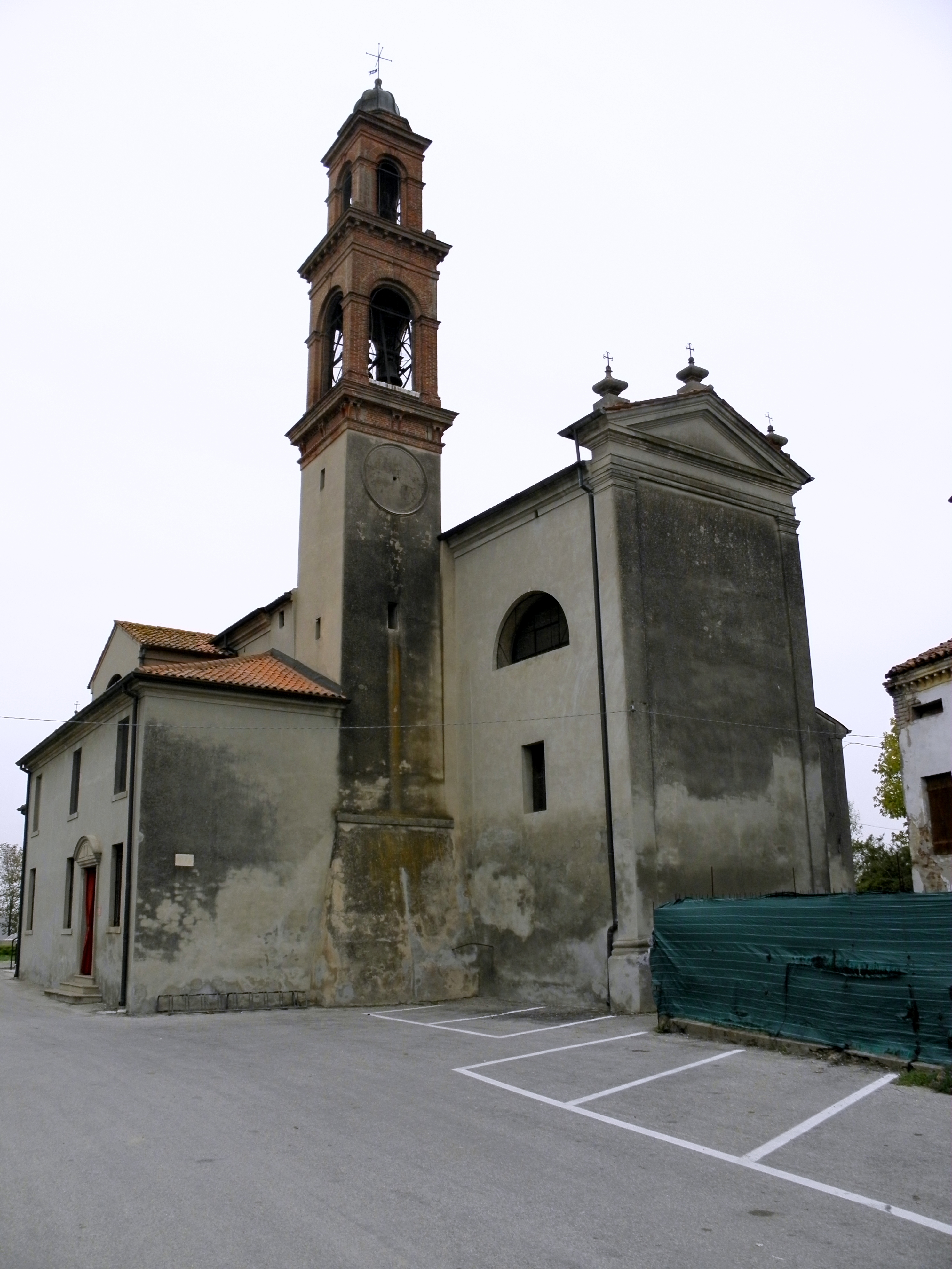 Villamarzana, chiesa parrocchiale di Santo Stefano: la parte posteriore con il campanile.